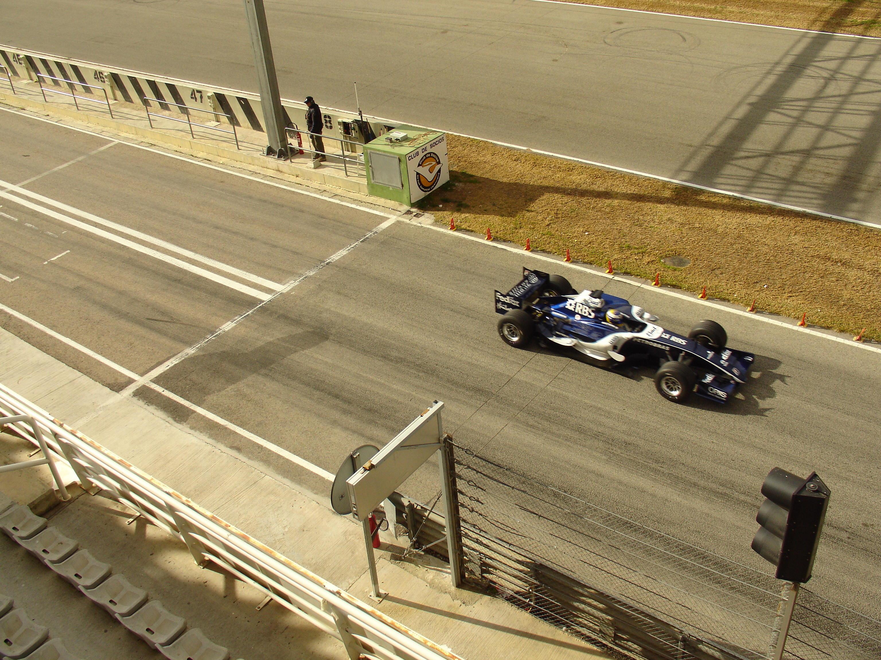 Nico Rosberg at Cheste Circuit (Valencia)